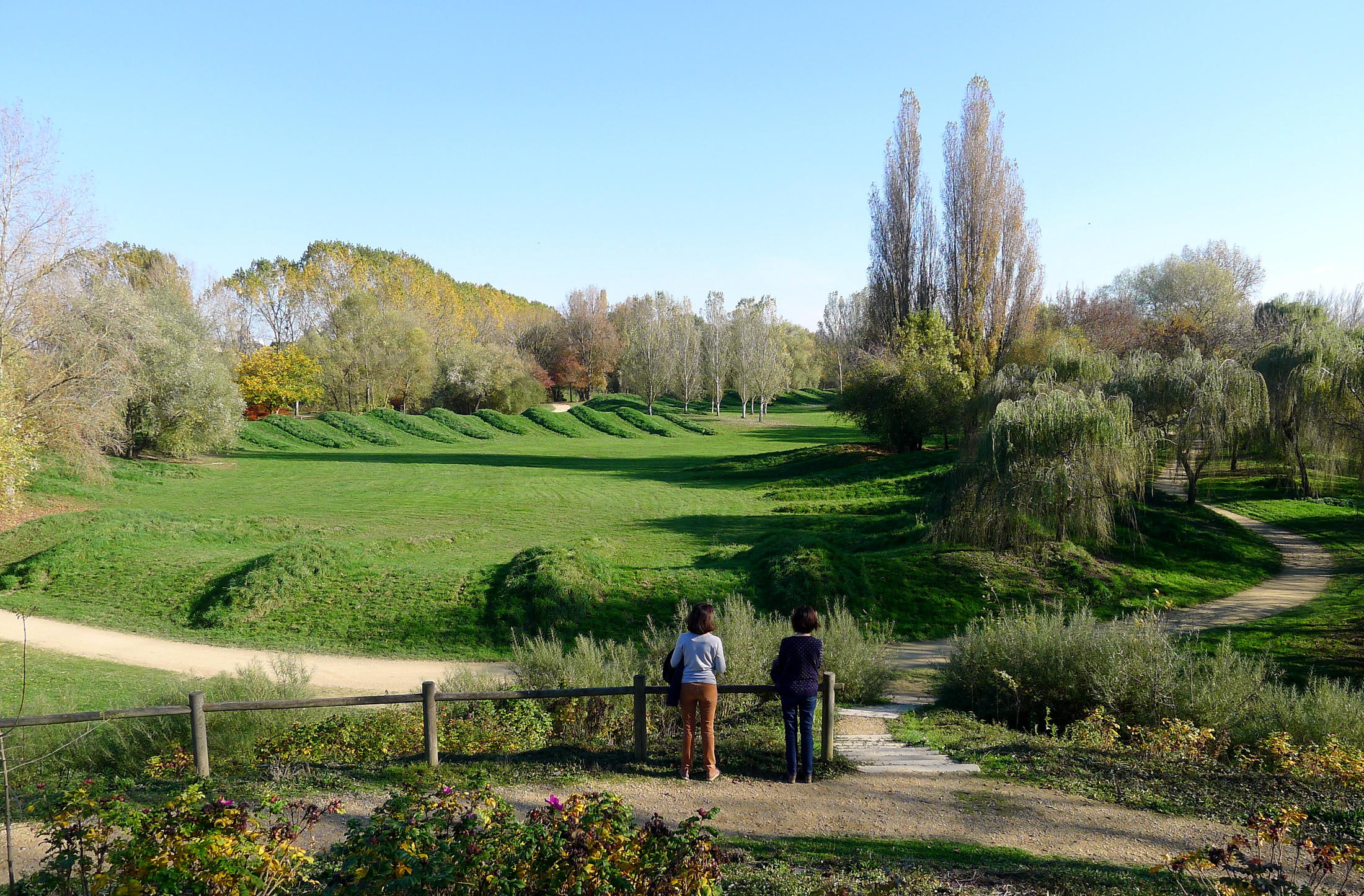 Parc de Balzac - Angers (Maine-et-Loire, France)